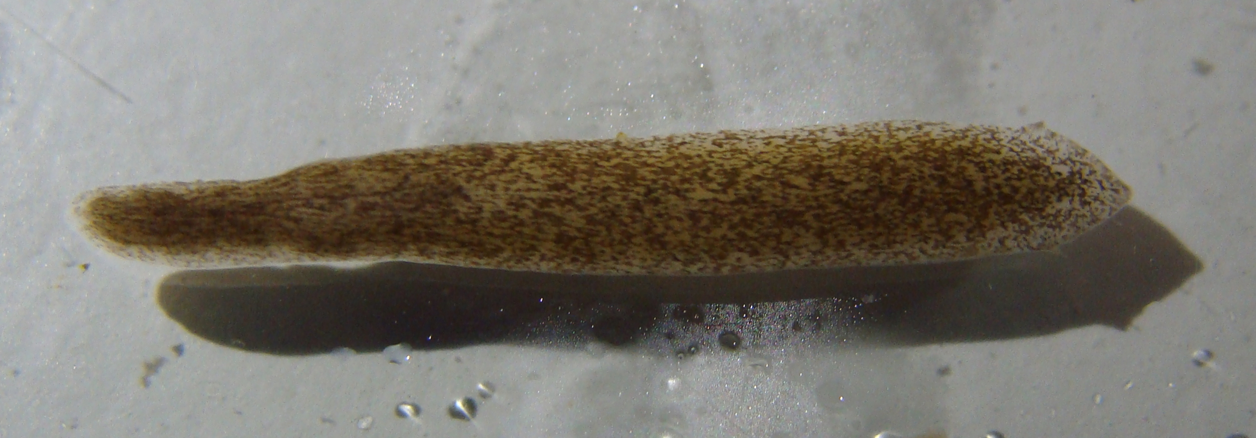 Living specimen of Girardia sp.